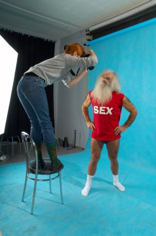 Екатерина Юрьевна Паньженская фотографирует МС Вспышкина